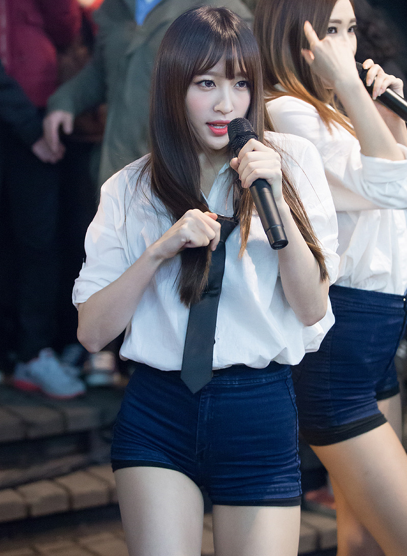 EXID 하니